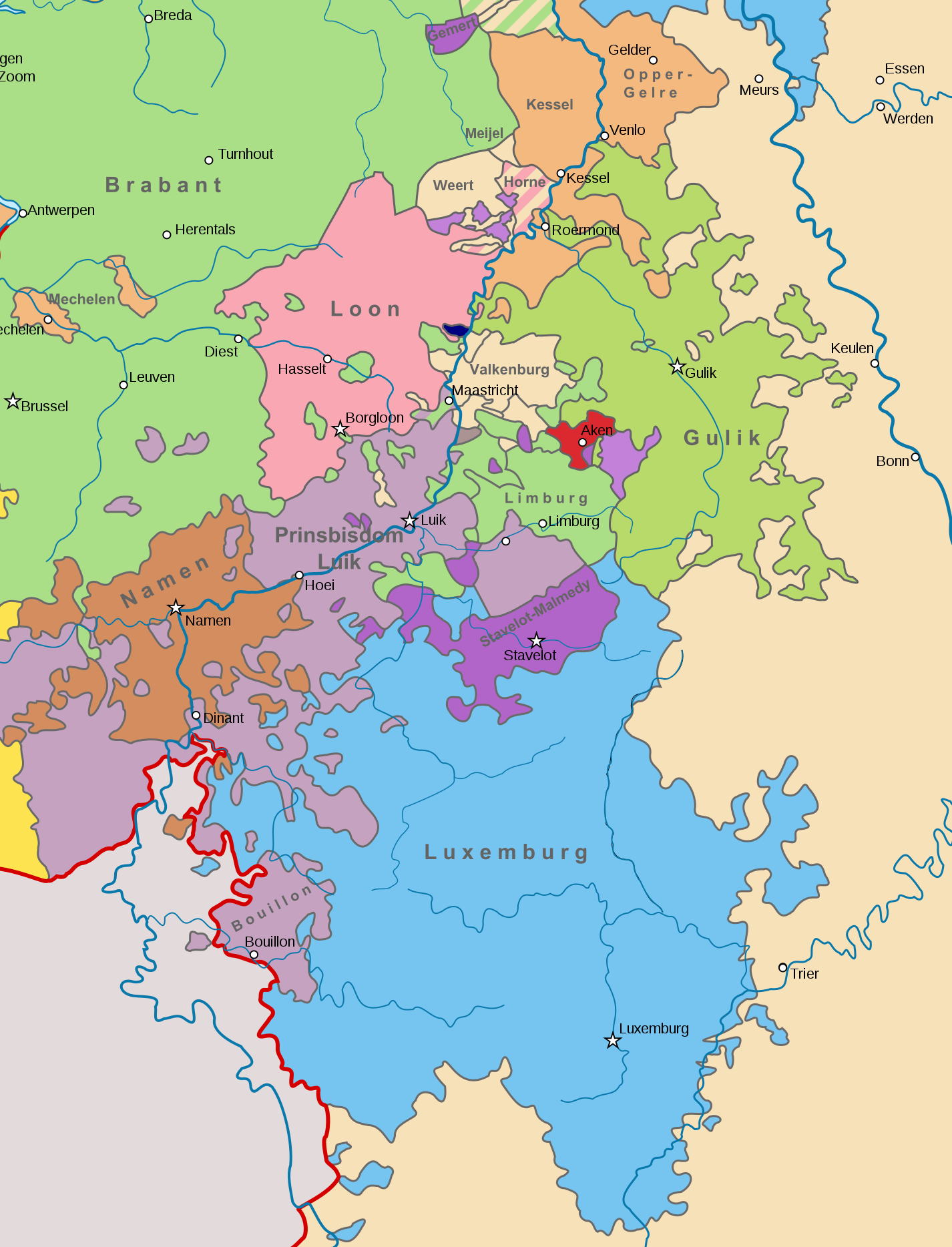 Die Karte ist auf Niederländisch beschriftet: „Aken“ = „Aachen“; „Keulen“ = „Köln“. In Werden (bei Essen) (in der Nordost-Ecke der Karte) war – wahrscheinlich bereits im 12. Jh. - die altniederländische „Rheinische Reimbibel“ entstanden (siehe auch den Artikel „Geschichte der niederländischen Rechtschreibung“, wo zwar von „Mittelfränkische[r] Reimbibel“ gesprochen wird, diese aber dennoch als Zeugnis der „Rechtschreibung des Altniederländischen“ [also des Altniederfränkischen] angeführt wird).